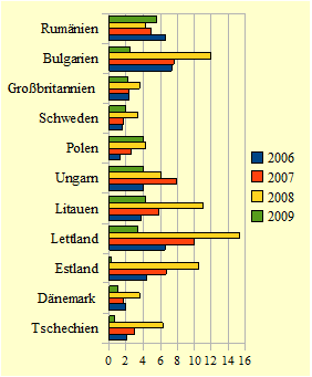 Inflationsraten der Nicht Euroländer im Vergleich zum Vorjahr in %